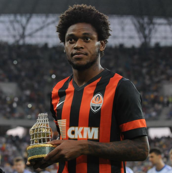 Шахтер 2:0 Динамо